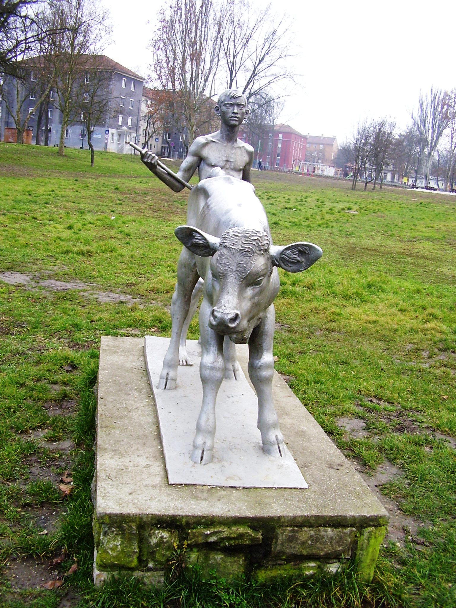 Győri Dezső: Borjút terelő fiú (1969) Az alumínium-szobor Kazincbarcikán a Völgy-park közepén található.